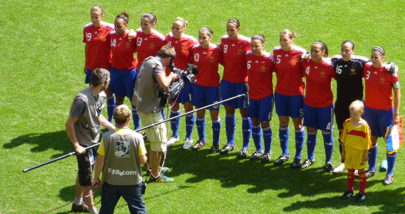 FIFA U-20-Weltmeisterschaft der Frauen 2010, Französische Nationalmannschaft, Spiel 17 in Augsburg